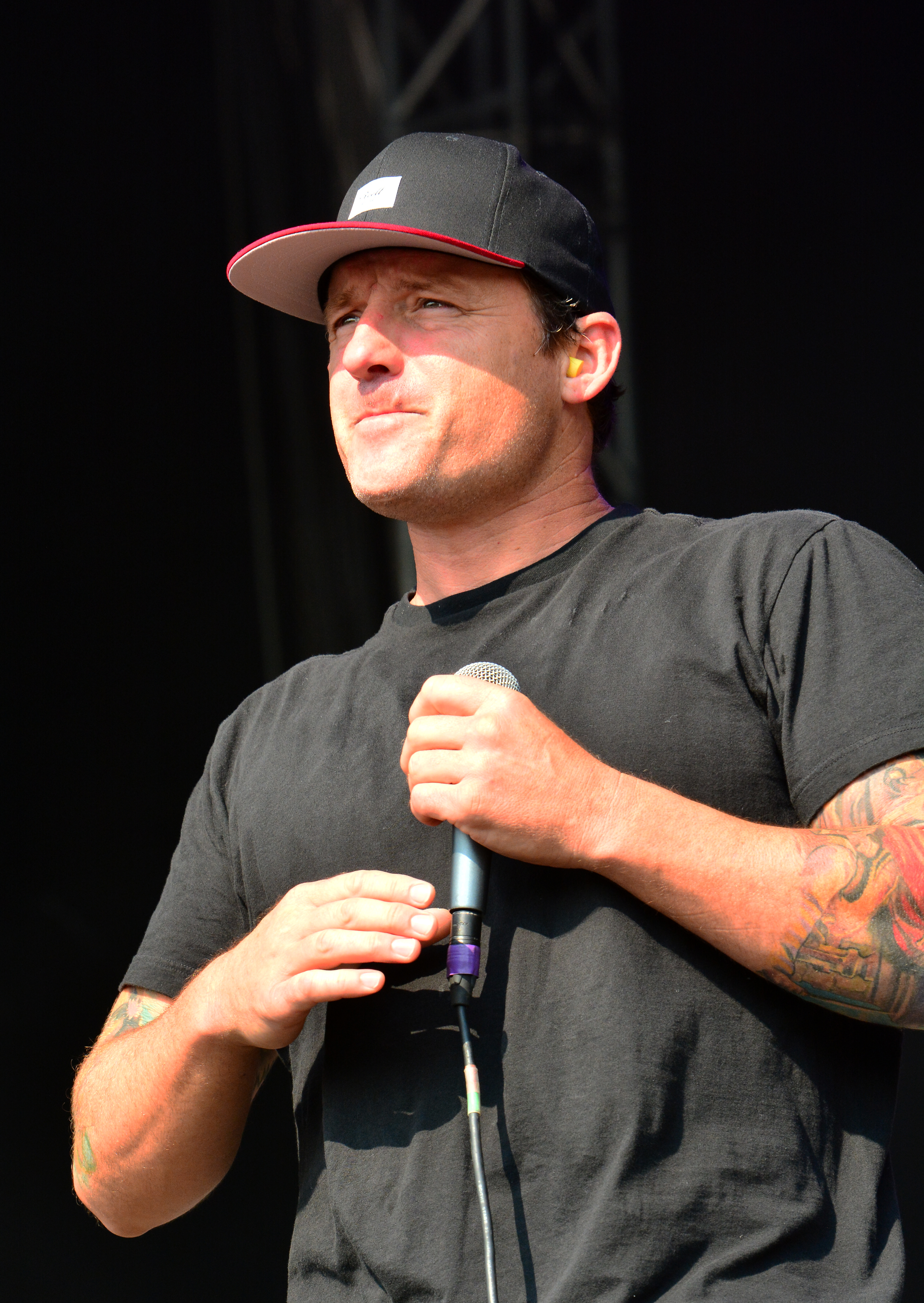 Ignite beim Reload Festival 2015